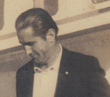 Esa fotografia es personal de mi padre, Omar Pabst